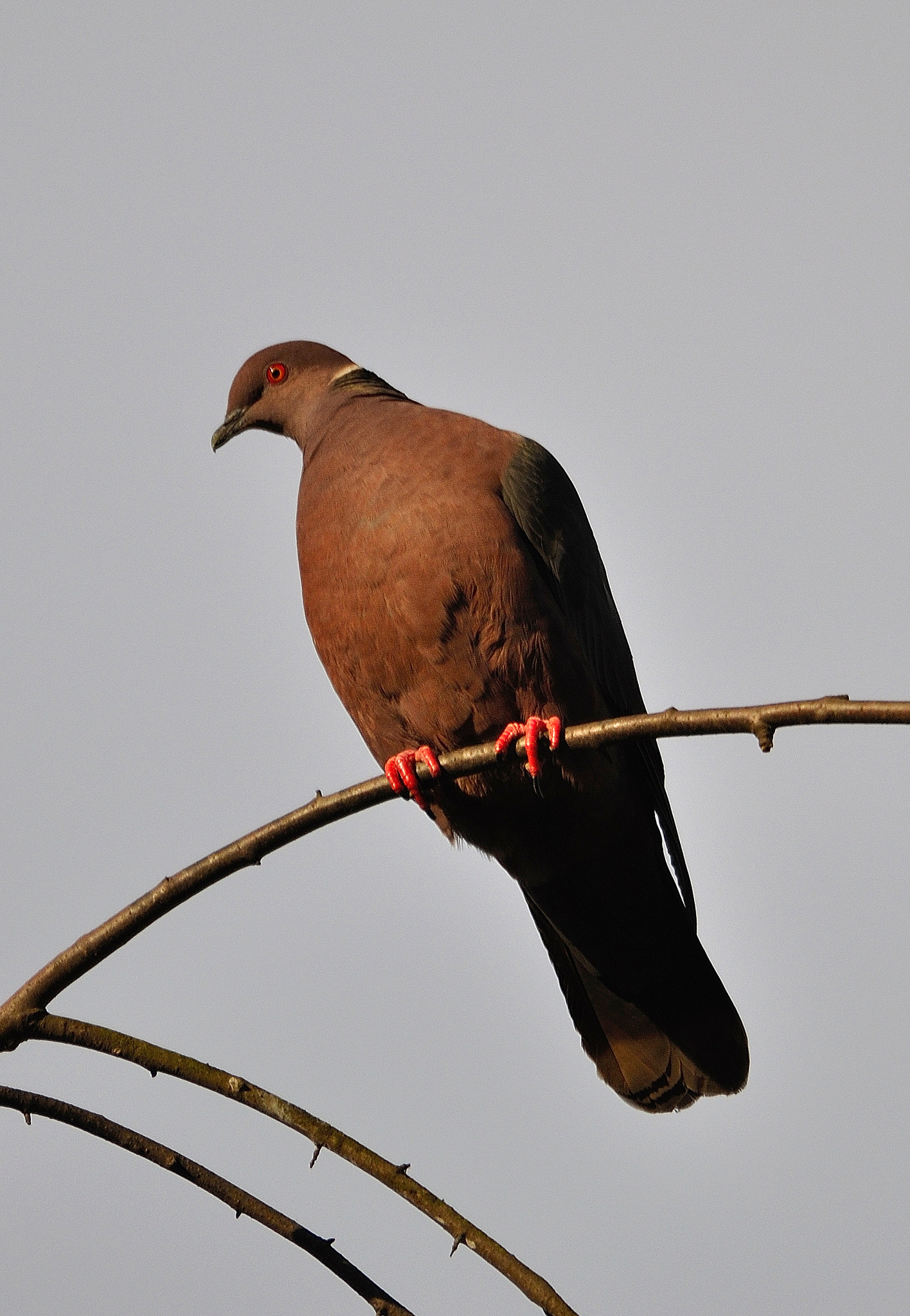 Torcaza en Chile Central